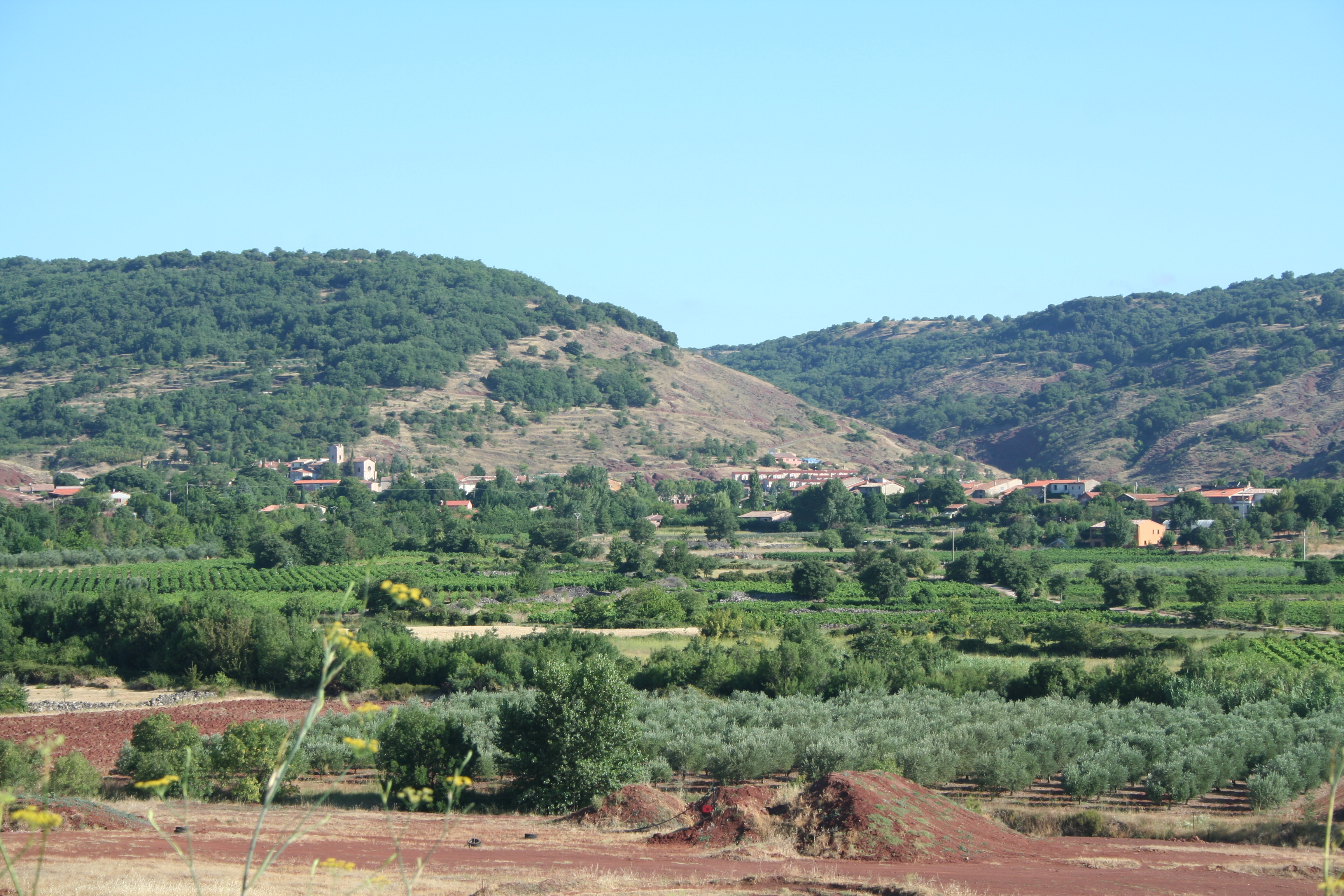 Octon (Hérault) - vue générale.